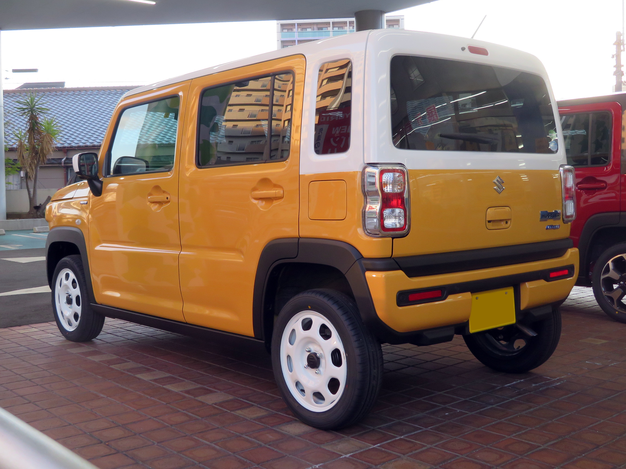 5AA-MR92S-HBGB-JN型スズキ・ハスラーHYBRID G 2WDをリアから撮影。